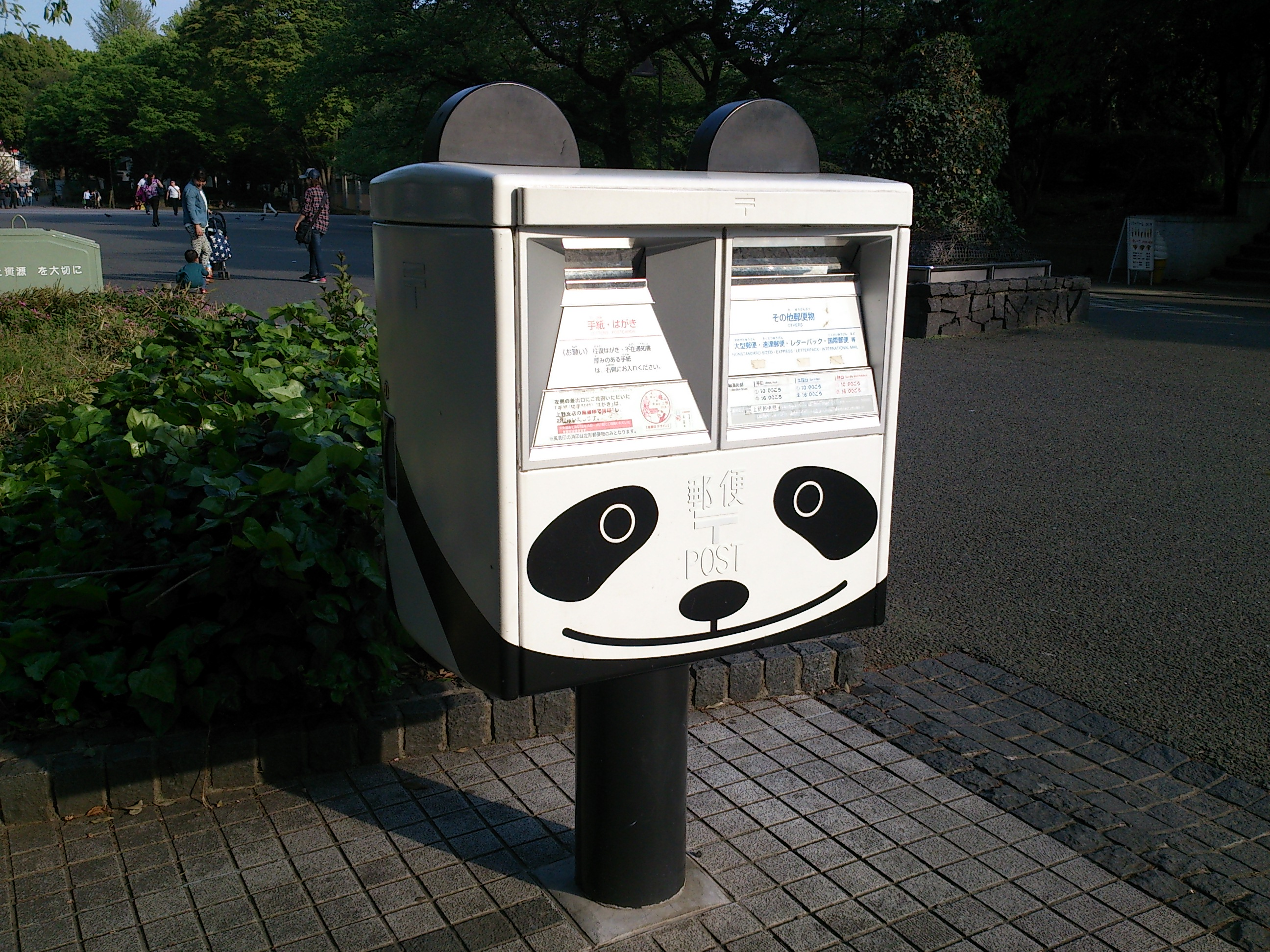 やっぱりパンダだね。 [1] [2] [3]